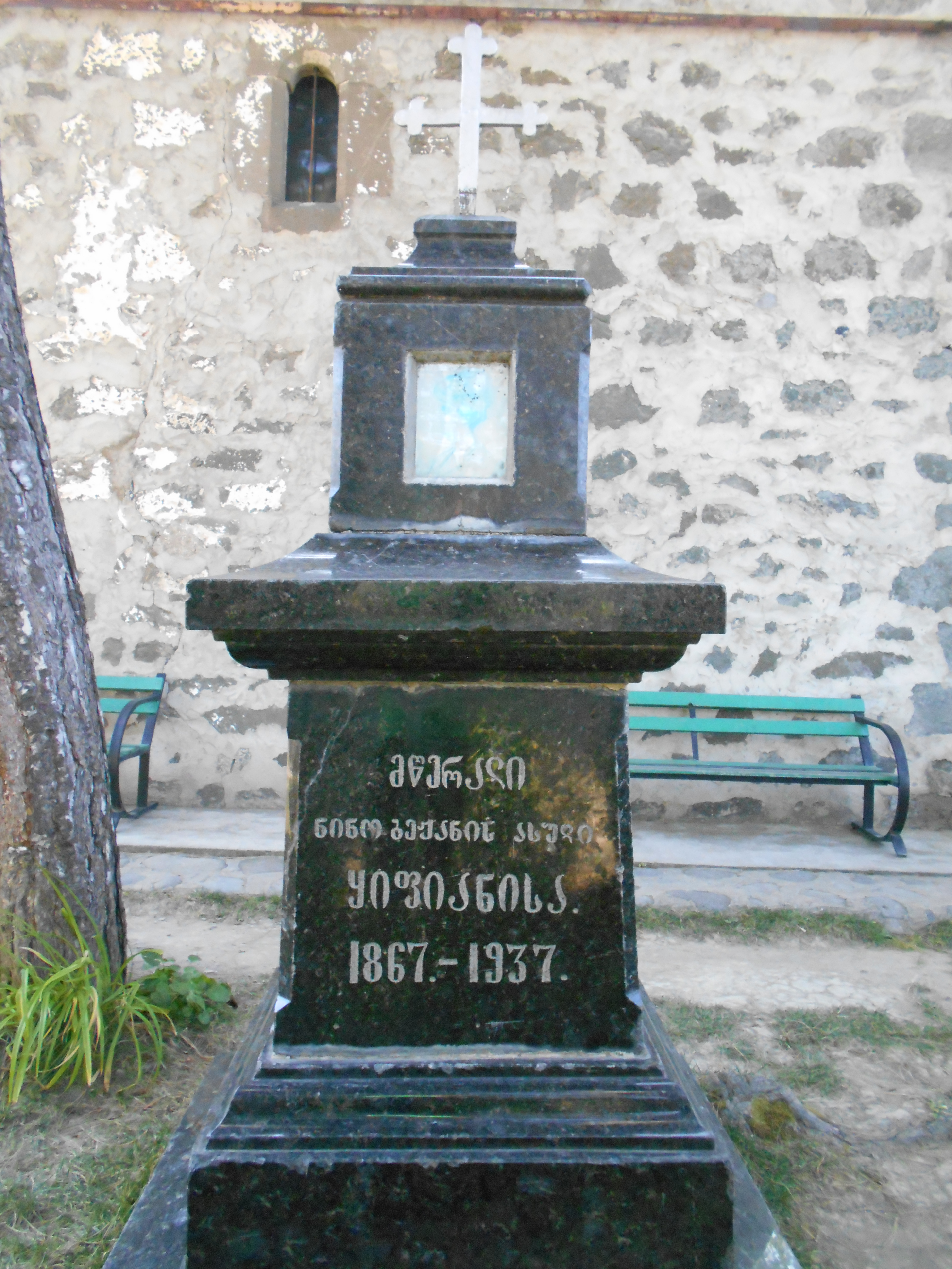 ნინო ტატიშვილი-ყიფიანის საფლავი სოფელ ქვიშხეთში (1867-1937) - ქართველი საზოგადო მოღვაწე, მწერალი, მთარგმნელი.